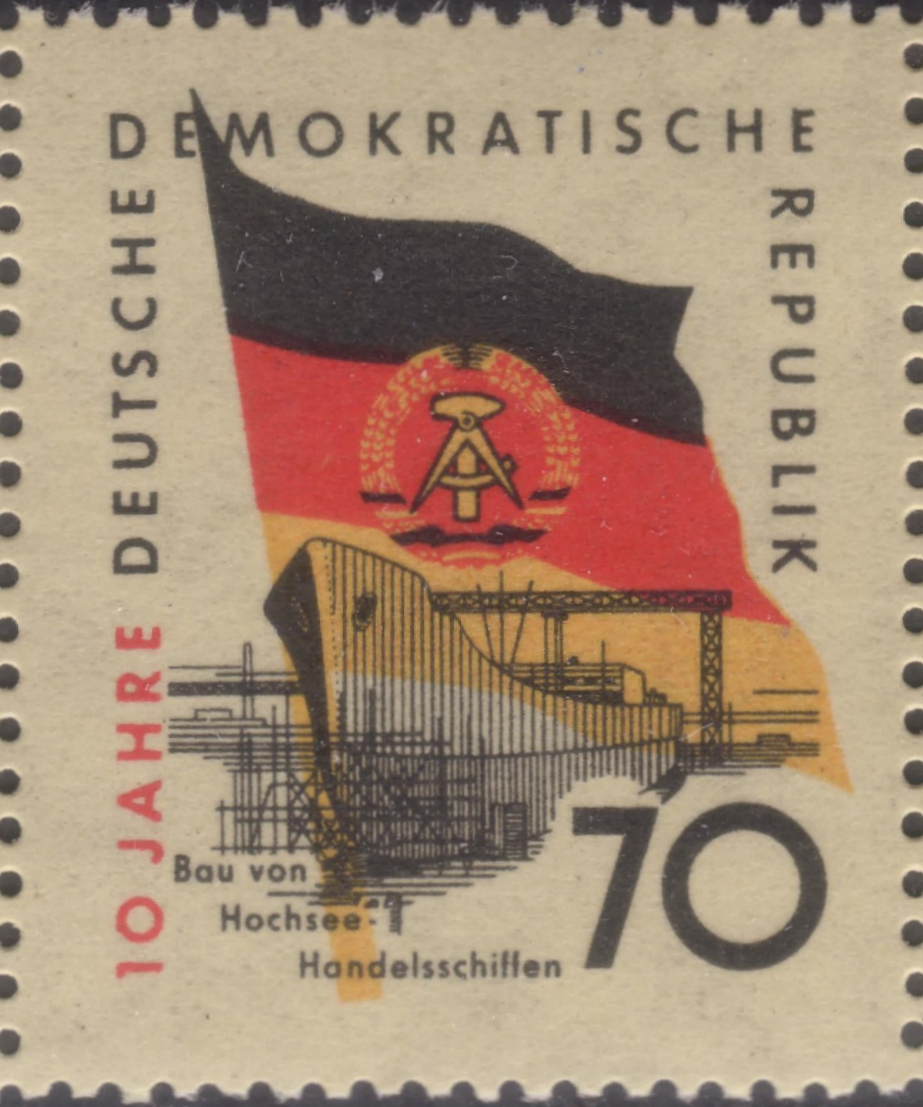 DDR-Briefmarke 1959 Michel-Nr. 730